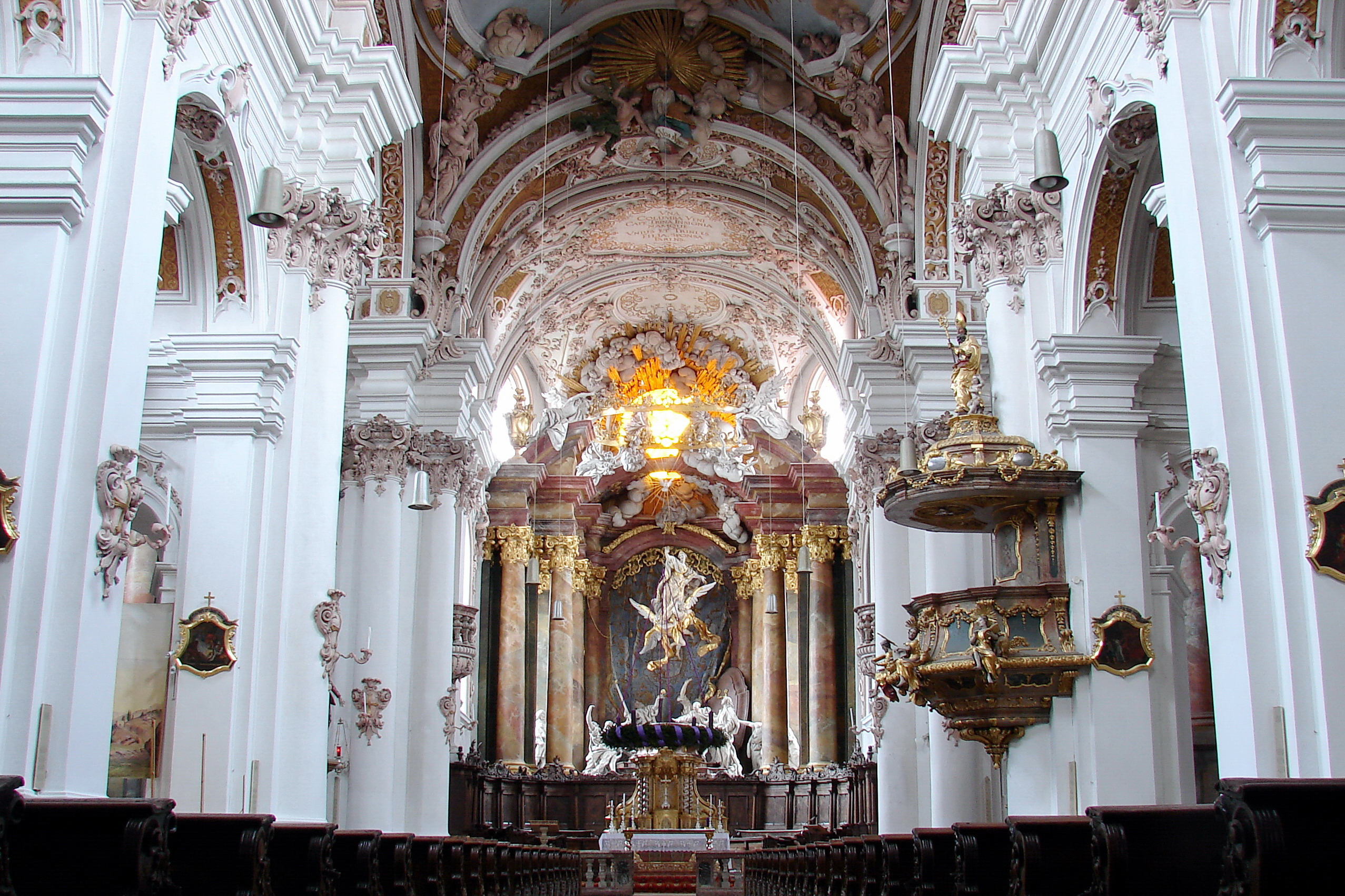 Berühmt ist das Kloster Rohr des Benediktinerordens dank seiner prächtigen Pfarr- und Klosterkirche im Barockstil, welche 1717-1783 von den Gebrüder Asam erbaut wurde. Kunsthistorisch betrachtet, ist die Darstellung der Himmelfahrt Mariens ein Meisterwerk.